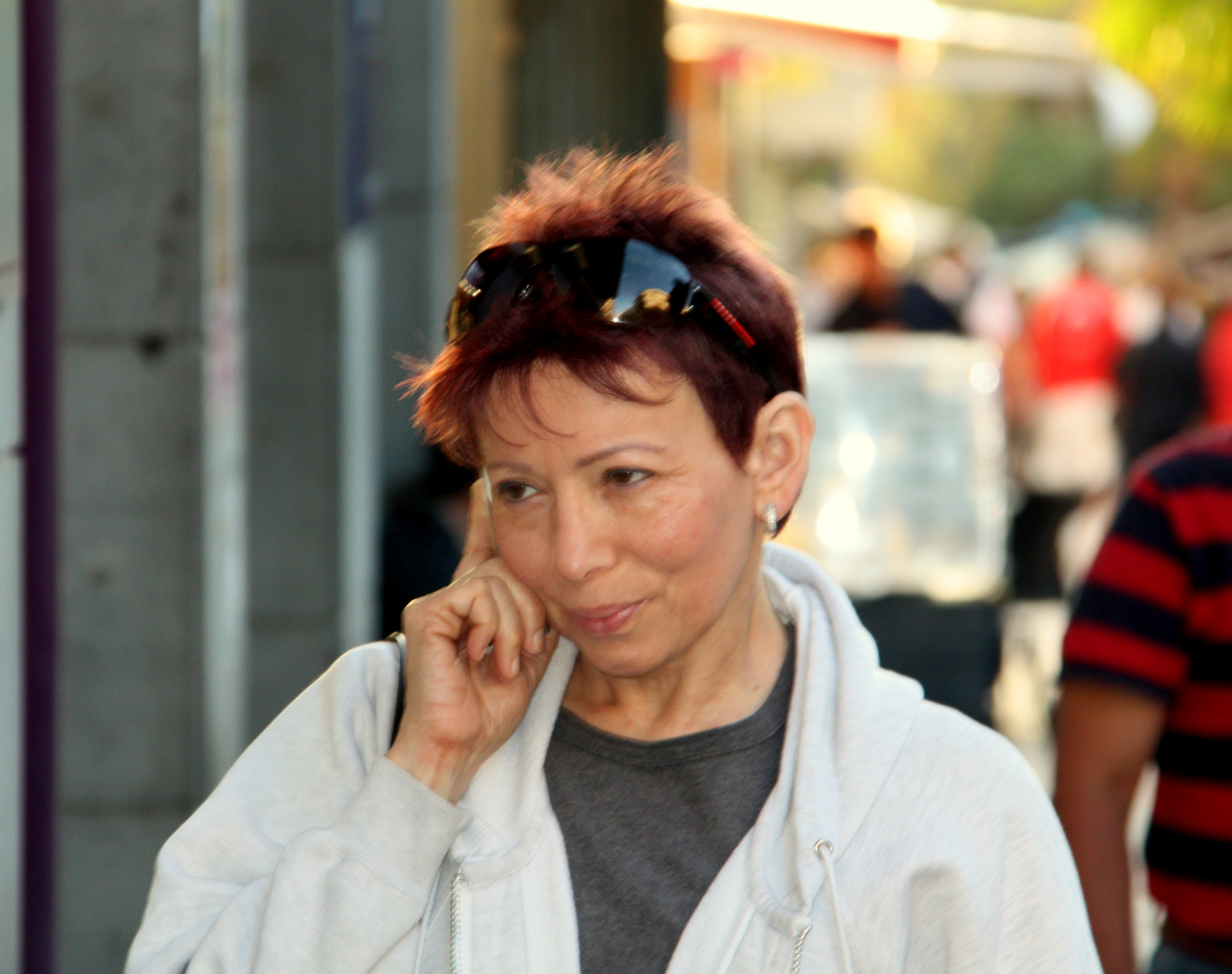 Reuvit Halperin